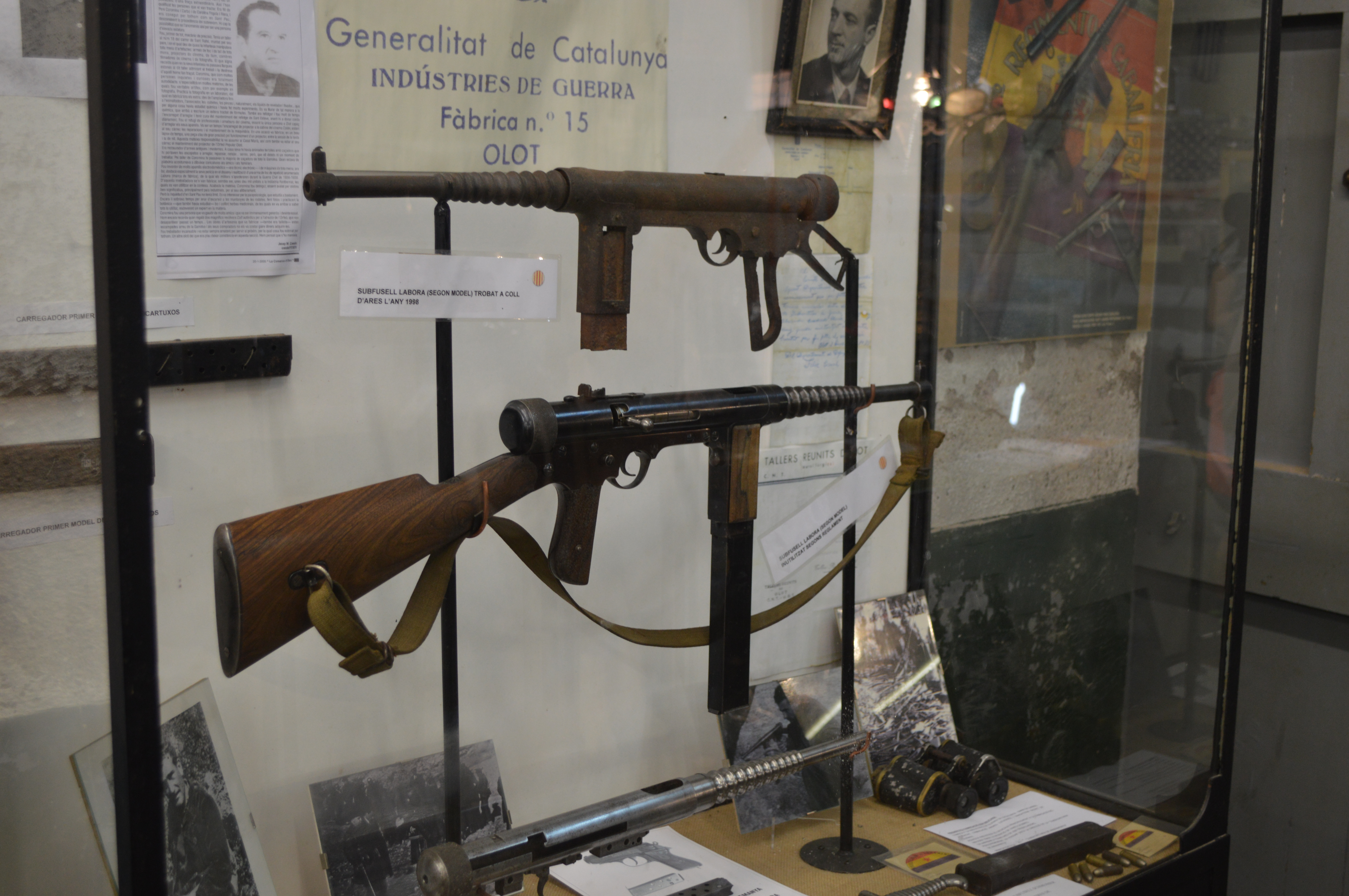 Vista des del darrere de dos subfusells Labora acabats i del canó d'un Fontbernat a mig fabricar.